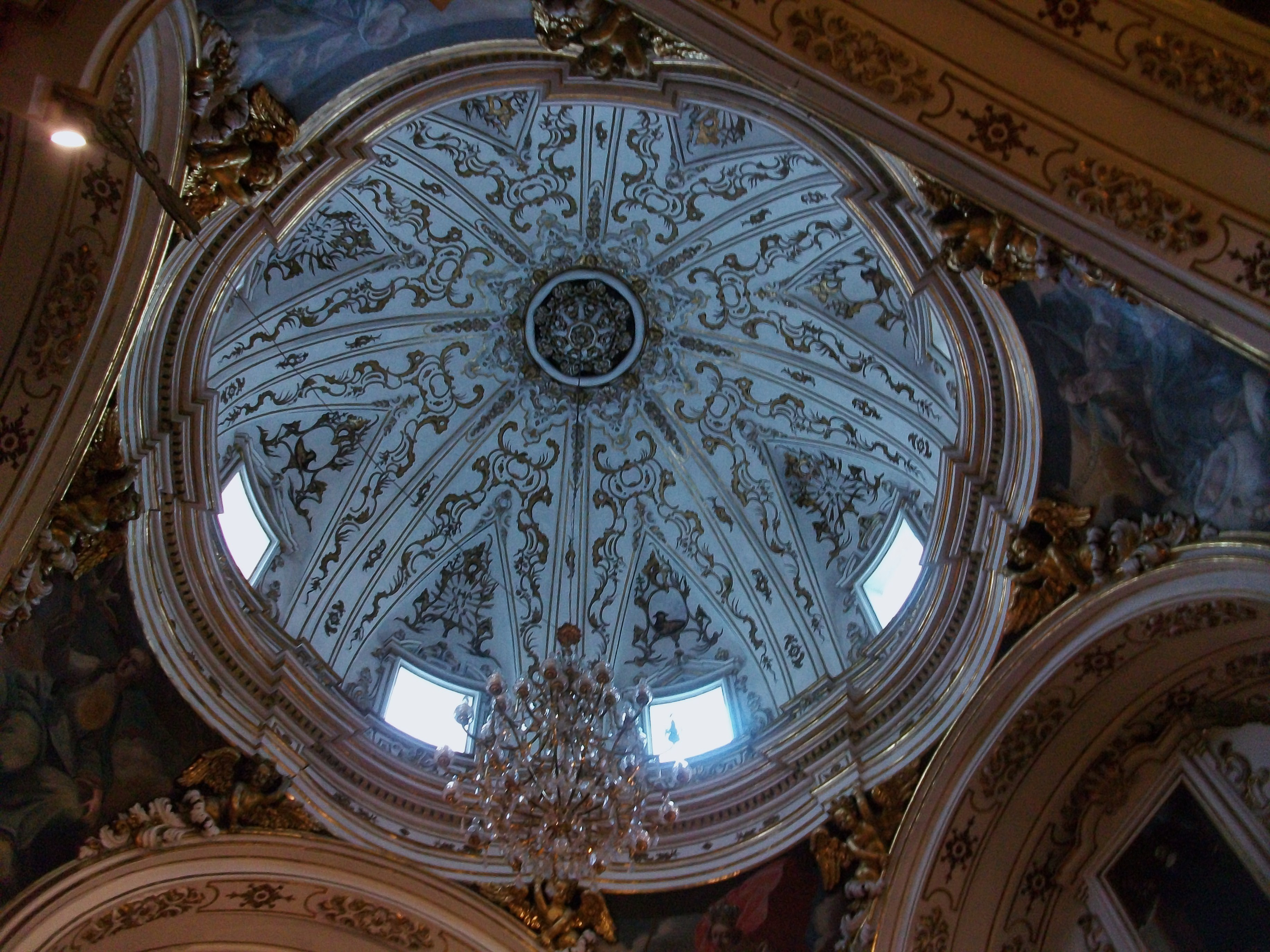 Cúpula de la capella de sant Francesc de Paula de l'església de sant Miquel i sant Sebastià de València.